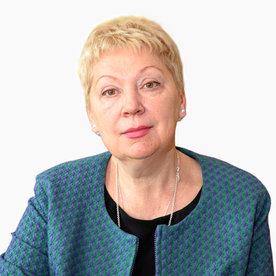 Министр образования и науки Российской Федерации Ольга Юрьевна Васильева.